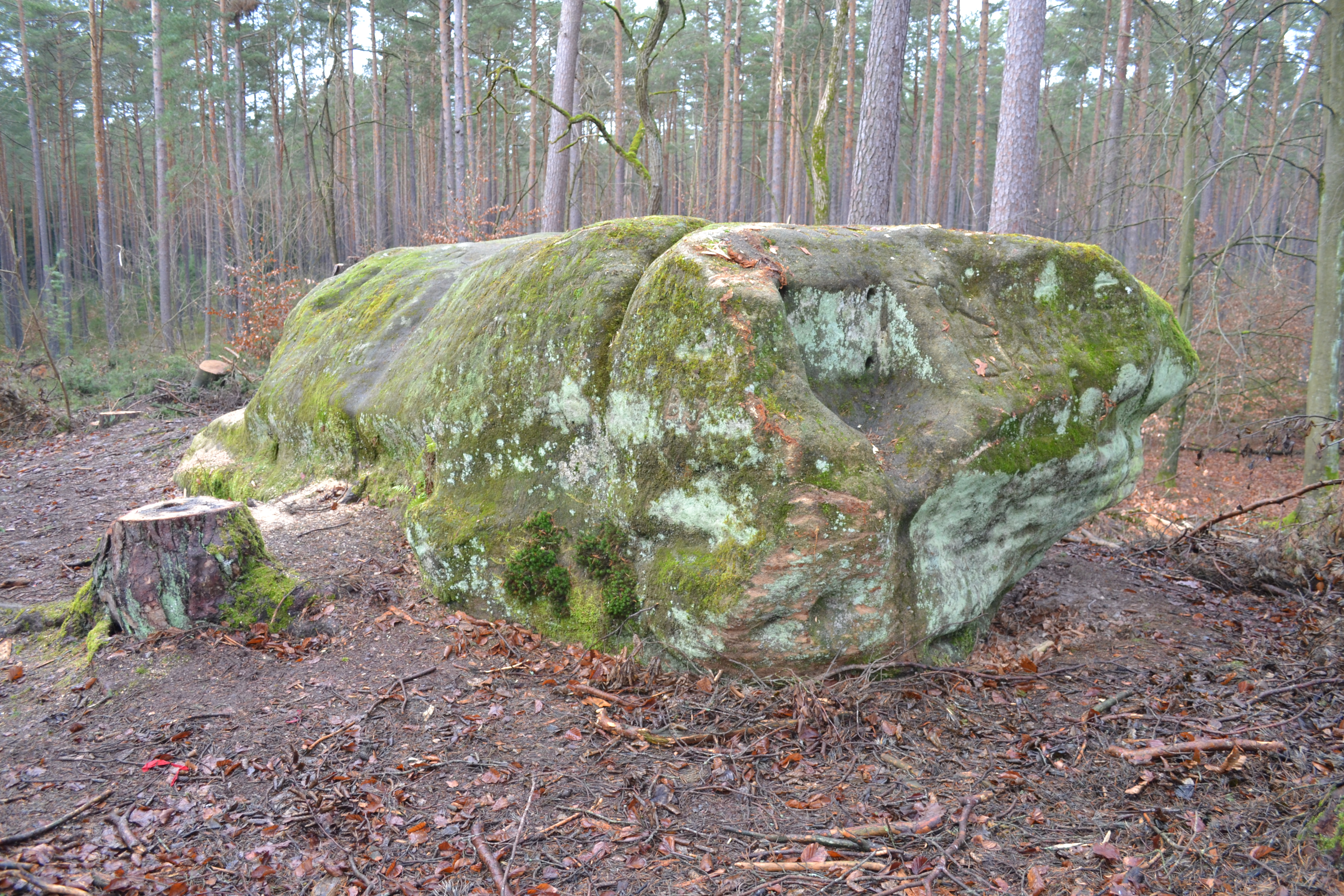 Gesamtansicht